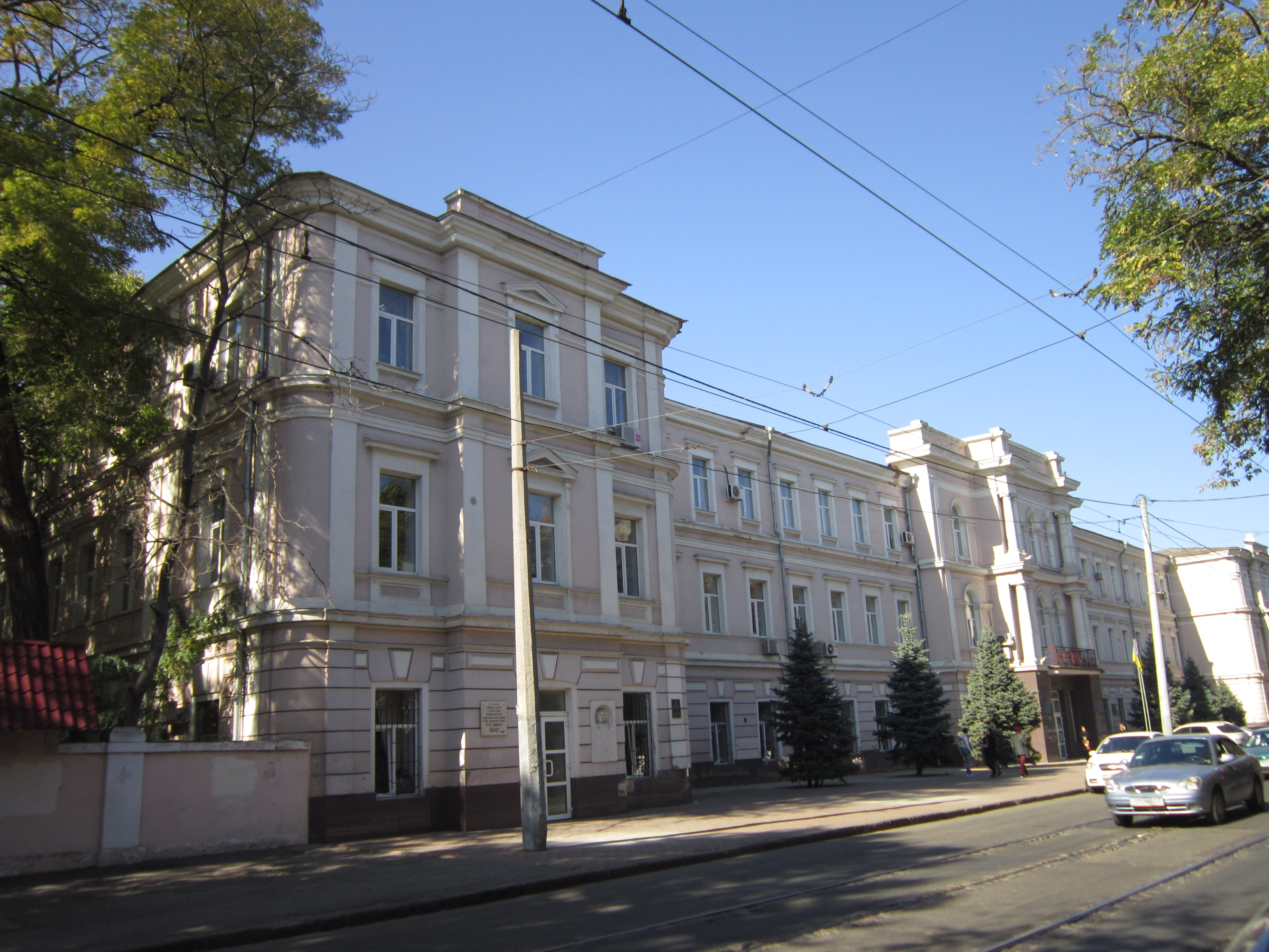 Будівля Другої чоловічої гімназії, у якому навчались:- О.Ю. Шмідт - вчений, акад., Герой Радянського Союзу;- С. Олійник - український поет;- вчився і до 1941 р. працював Д.П. Надеїн - український поет журналіст;- С.К. Цвигун - військовий діяч і письменник, Герой соціалістичної Праці, генерал армії, Одеса, Старопортофранківська вул., 26 (ріг вулиць Старопортофранківської, 26, Градоначальницької та Розкидайлівської)